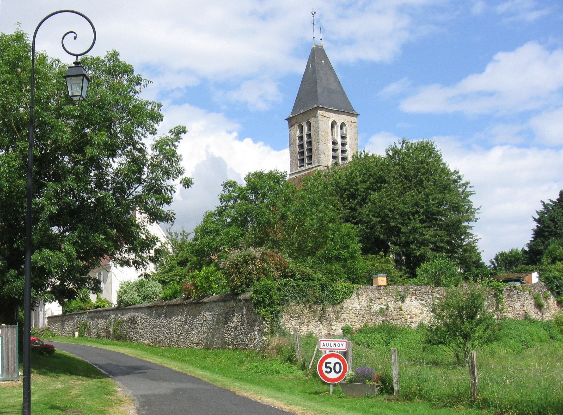 Village d'Aulnoy. (Seine-et-Marne, région Île-de-France).